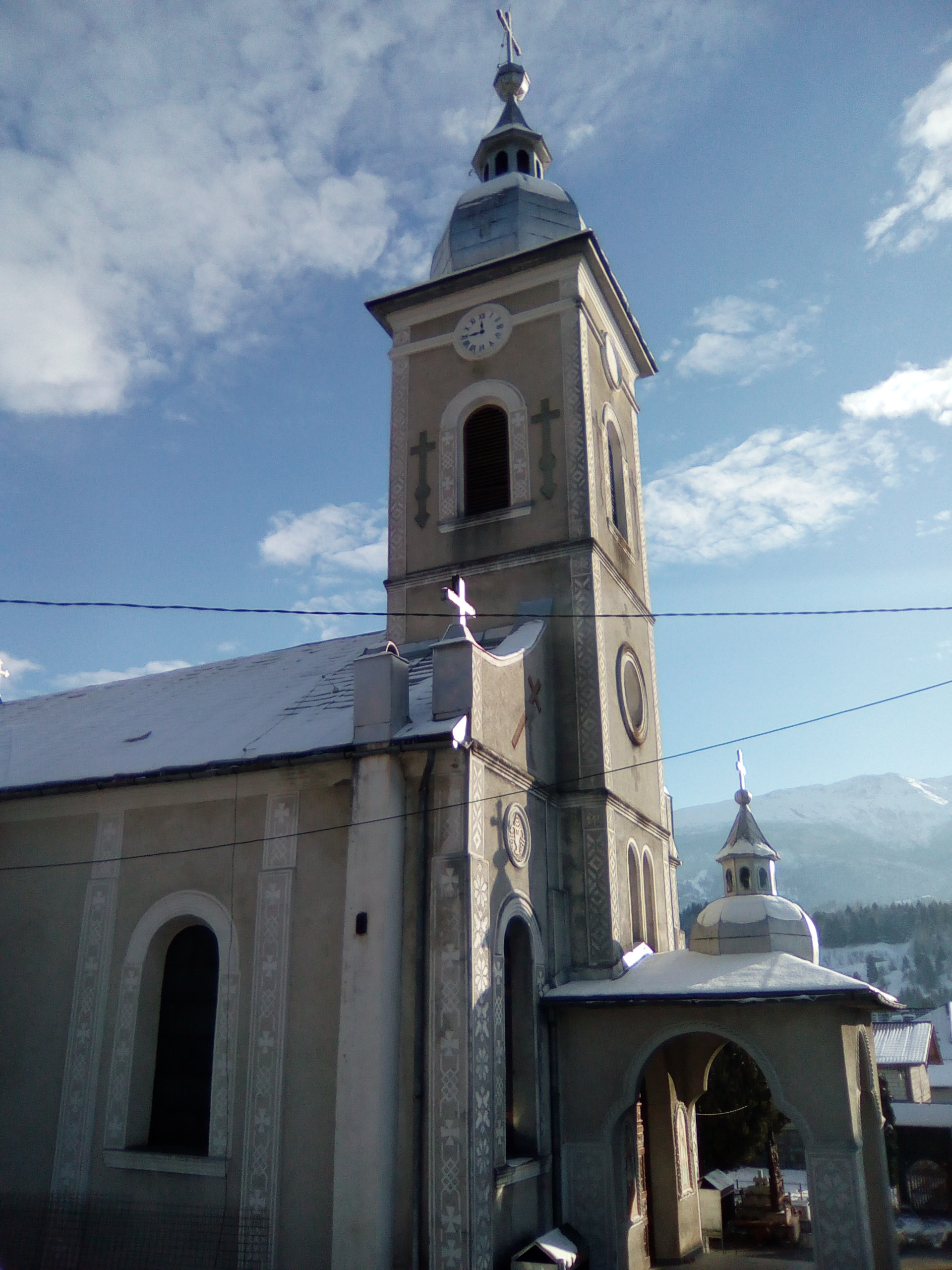 A fost construita in secolul al XIX-lea.